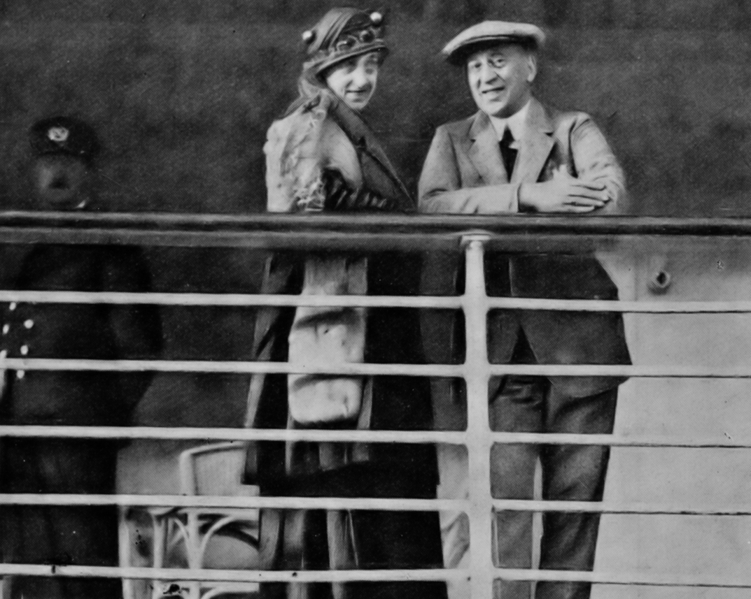 Louis Couperus en echtgenote op de boot naar Indie in 1921